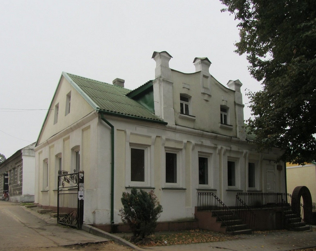 Краявіды Камянца